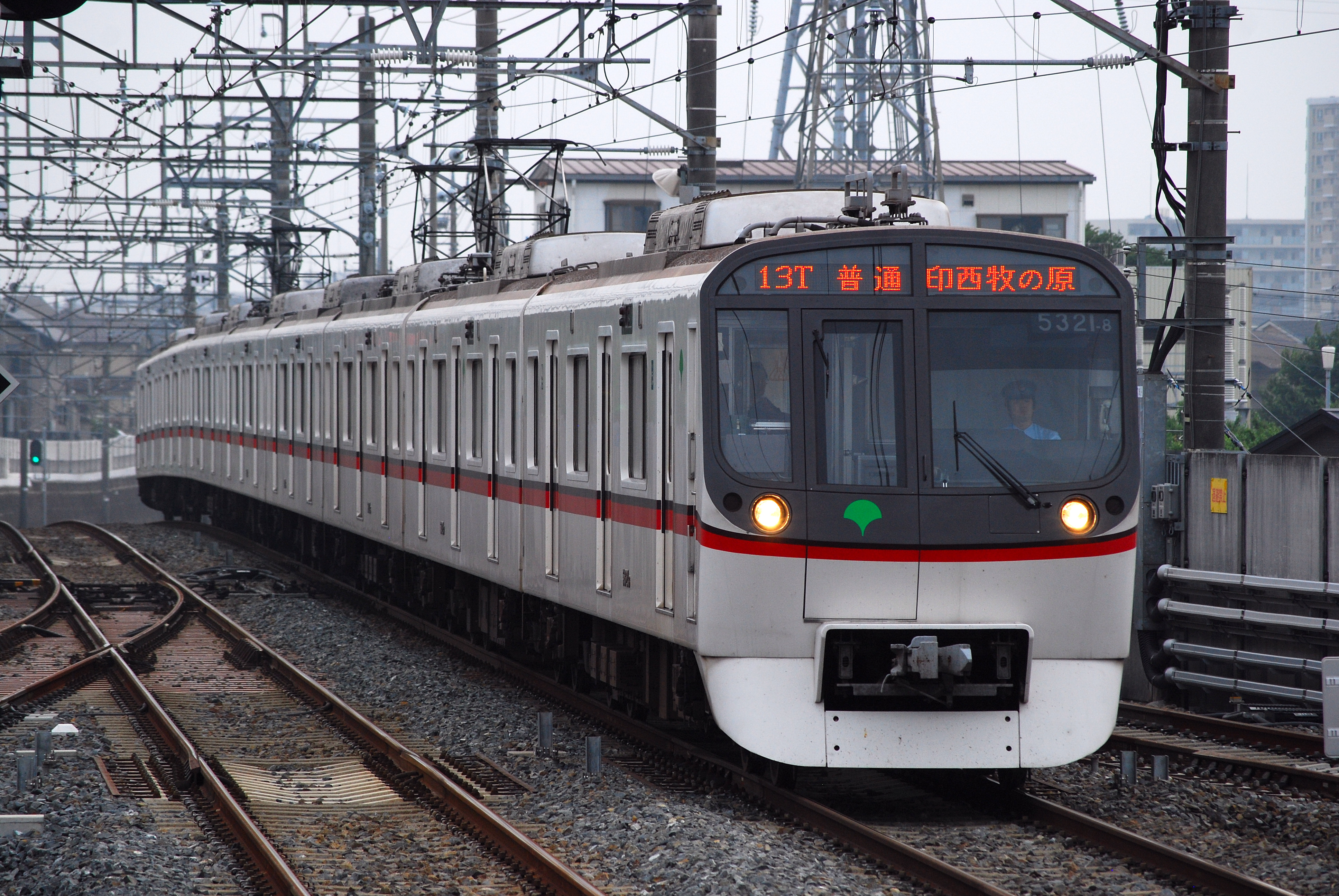 都営浅草線の5300系（北総線東松戸駅）